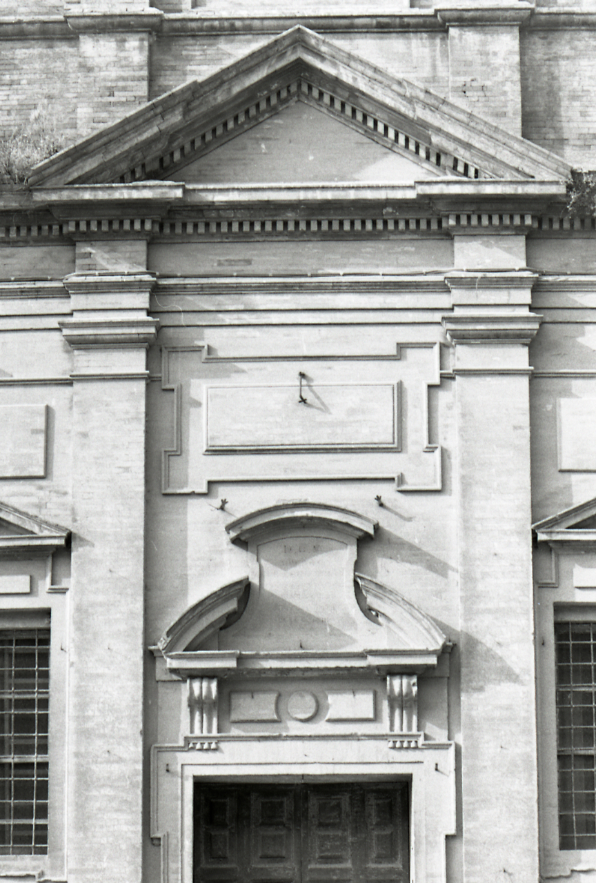 Servizio fotografico : Cesena, 1972 / Paolo Monti. - Strisce: 3, Fotogrammi complessivi: 15 : Negativo b/n, gelatina bromuro d'argento/ pellicola ; 35 mm. - ((Sul portanegativi: NIKMAT FP4. - All'interno del portanegativi: la serie è anche identificata da una linea orizzontale a pennarello blu che separa la suddetta serie dalla precedente di soggetto diverso; sulla faccia interna in corrispondenza dei numeri di fotogrammi stampati: iscrizione didascalica manoscritta a penna nera "Cesena". - Occasione: Campagna di rilevamento (prima) del centro storico. - Fonte: Agenda di Paolo Monti: Leica 1501-3000 Controllo numerazione (1950-1978), presso Archivio Paolo Monti. - Fonte: Monografia di Dradi Maraldi Biagio, Emiliani Andrea (a cura di): Cesena: il volto della città, Cesena, Banca Popolare di Cesena (1973)